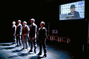 Imagen del estreno de la obra teatral Fair Play de Antonio Rojano en la Sala Cuarta Pared de Madrid. Octubre, 2011.